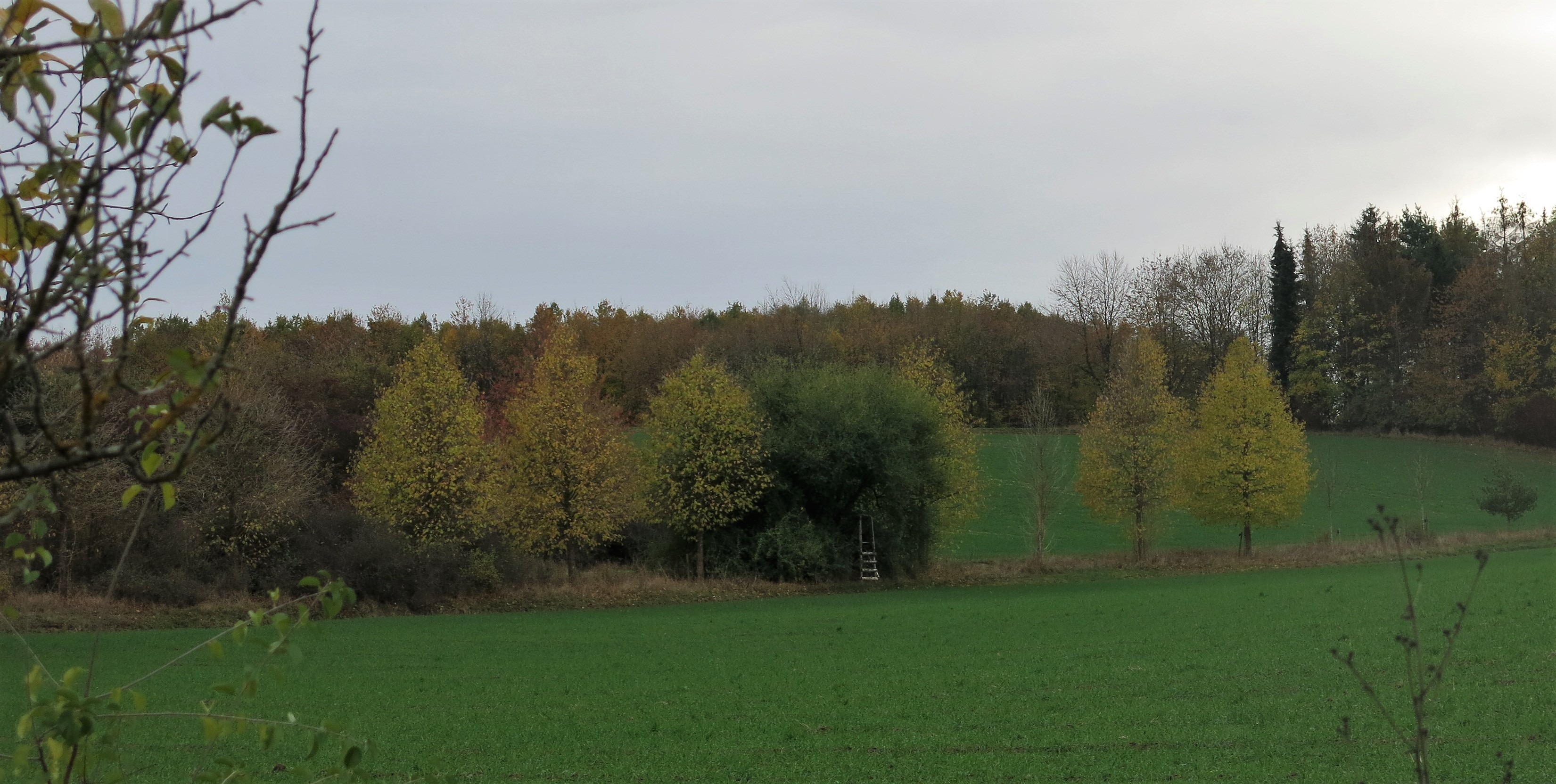 Baumhaseln als Straßenbäume am Radweg hinter dem Saupurzel (im Geotop Flugsande)